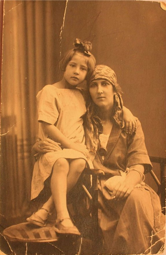 Дочь Мерьем и внучка Нияр Измаила Мурзы Муфтия-Заде (январь 1841 — апрель 1917), полковника в отставке, депутата Государственной думы III созыва от Таврической губернии